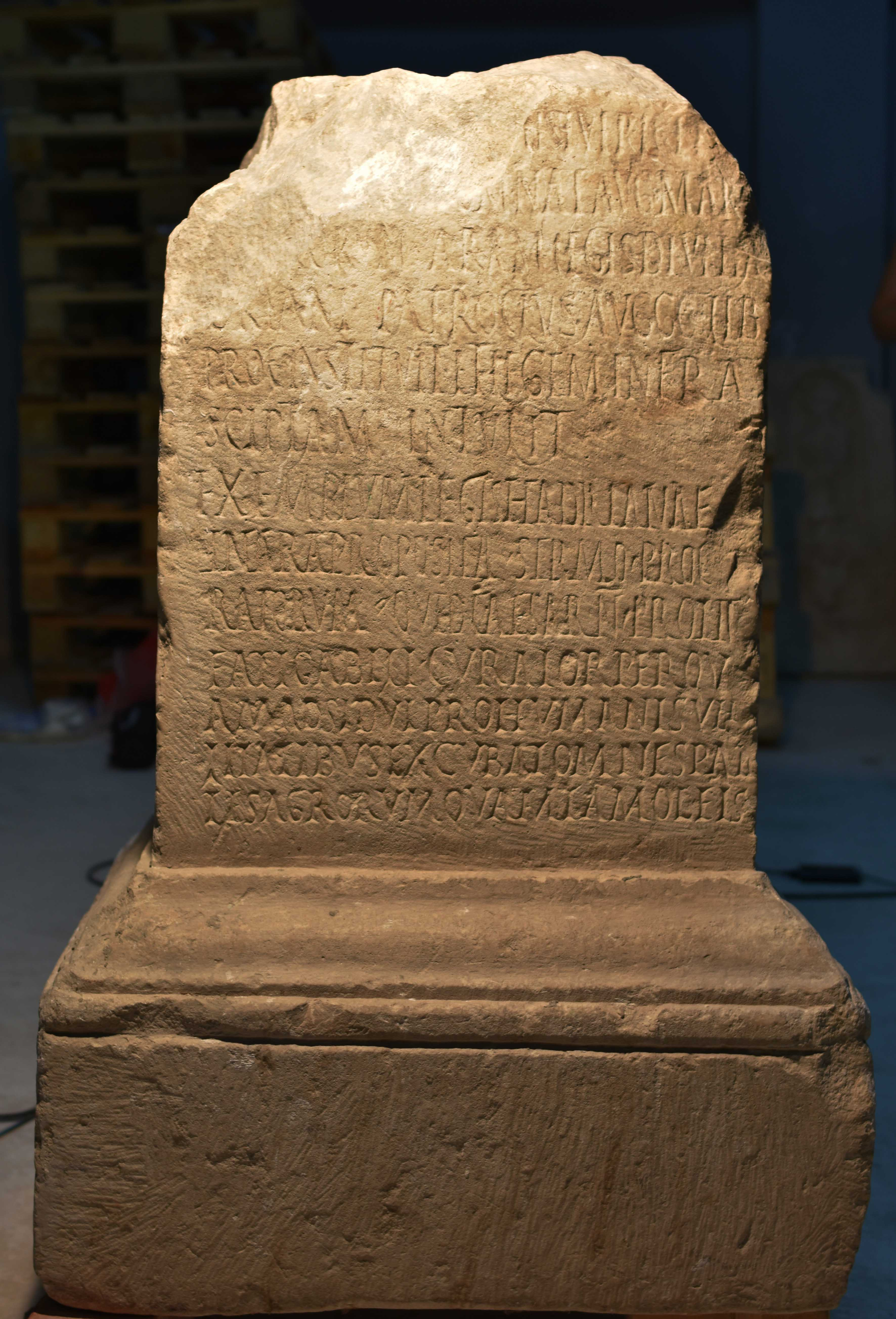 Cara 1 de la inscripció d'Aïn Wassel, conservada al Museu del Bardo, amb les primeres línies del sermo procuratorum